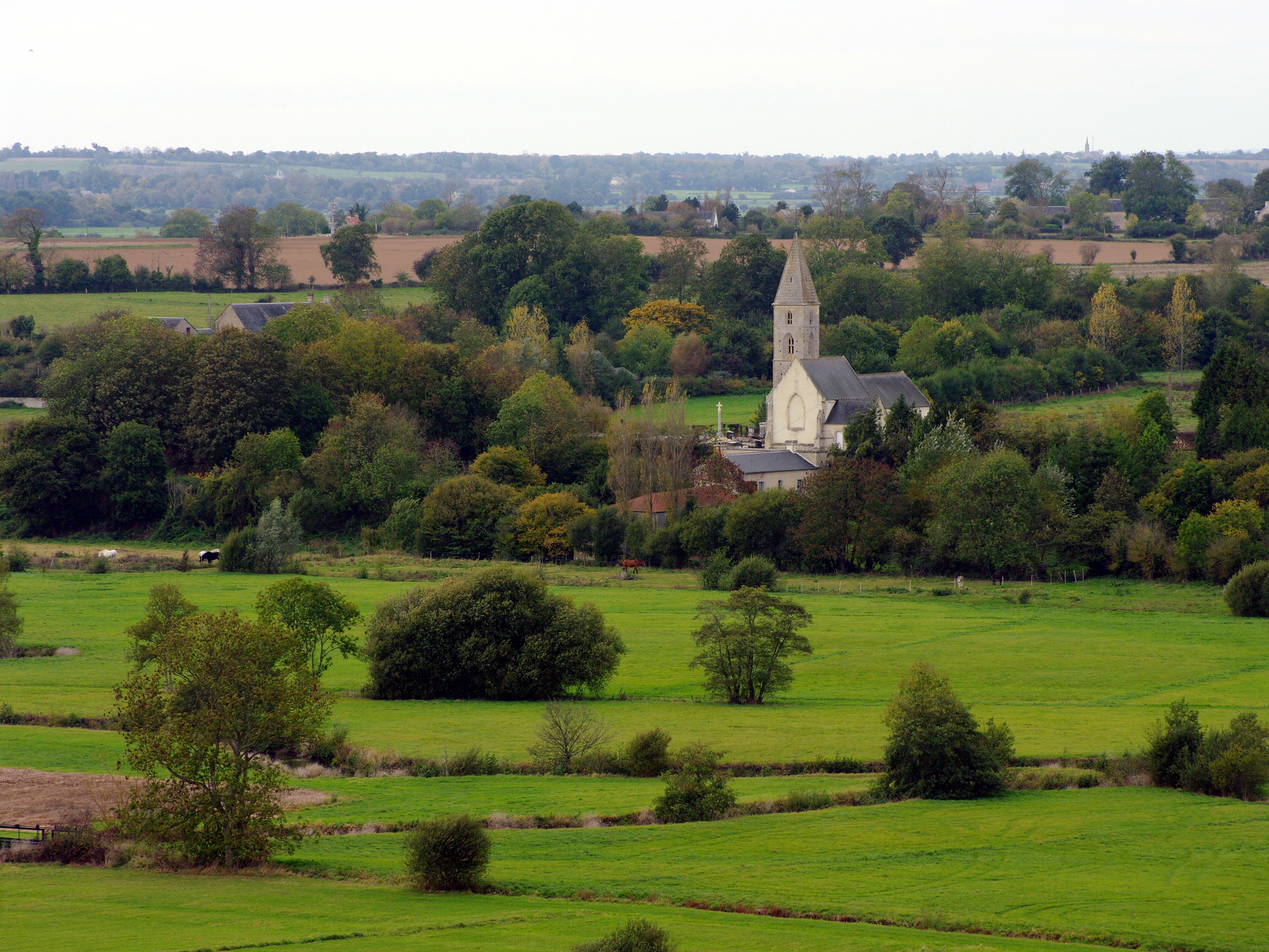 L'église Saint-Pierre à Aignerville, Calvados.